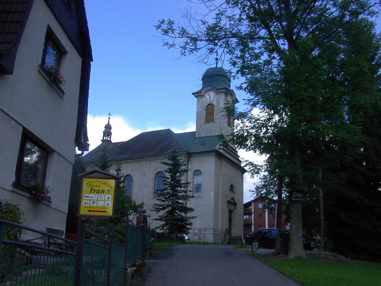 Kostel sv.Václava v Harrachově.